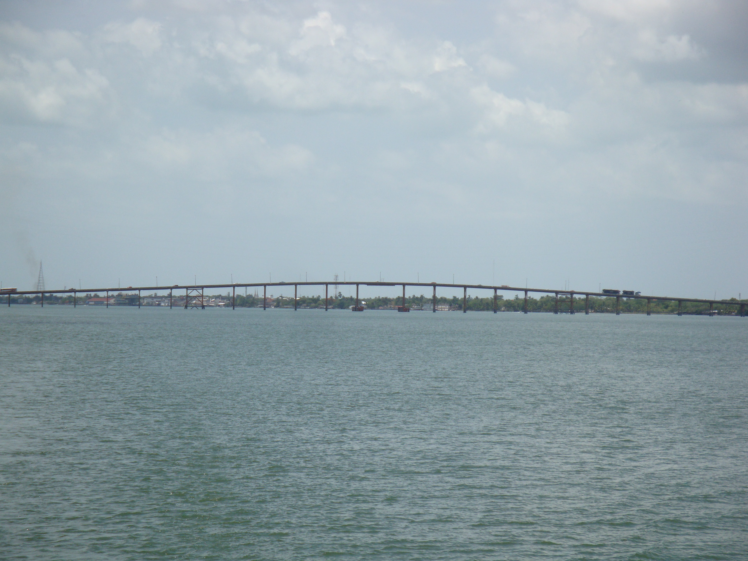 "Puente Frontera" municipio de Centla, estado mexicano de Tabasco. Inaugurado el 2 de febrero de 1986 por el gobernador Enrique González Pedrero.